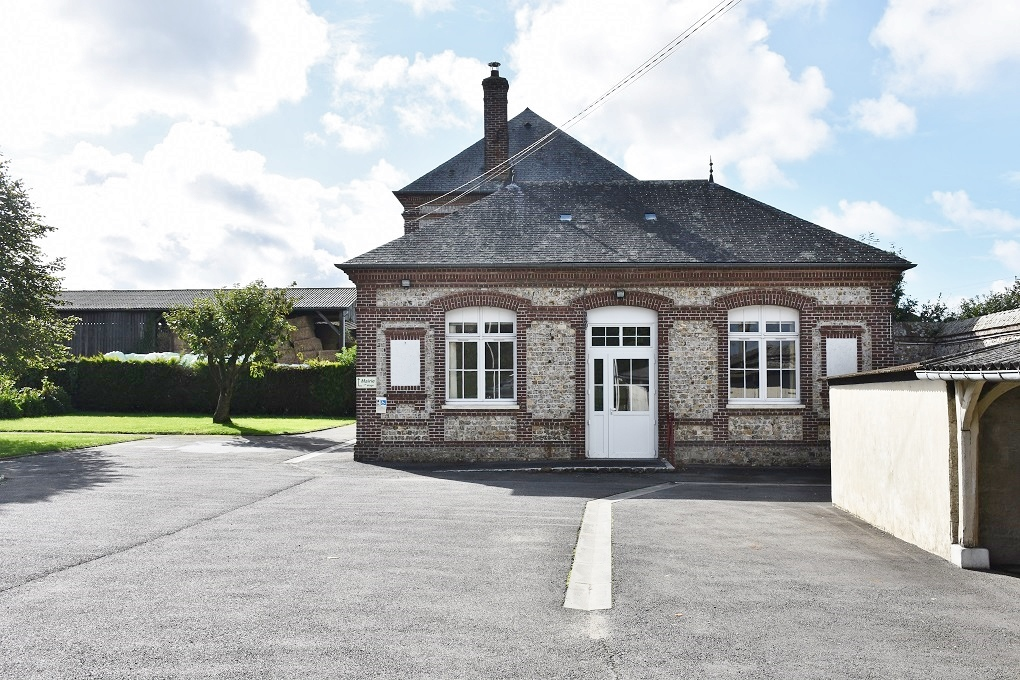 la mairie